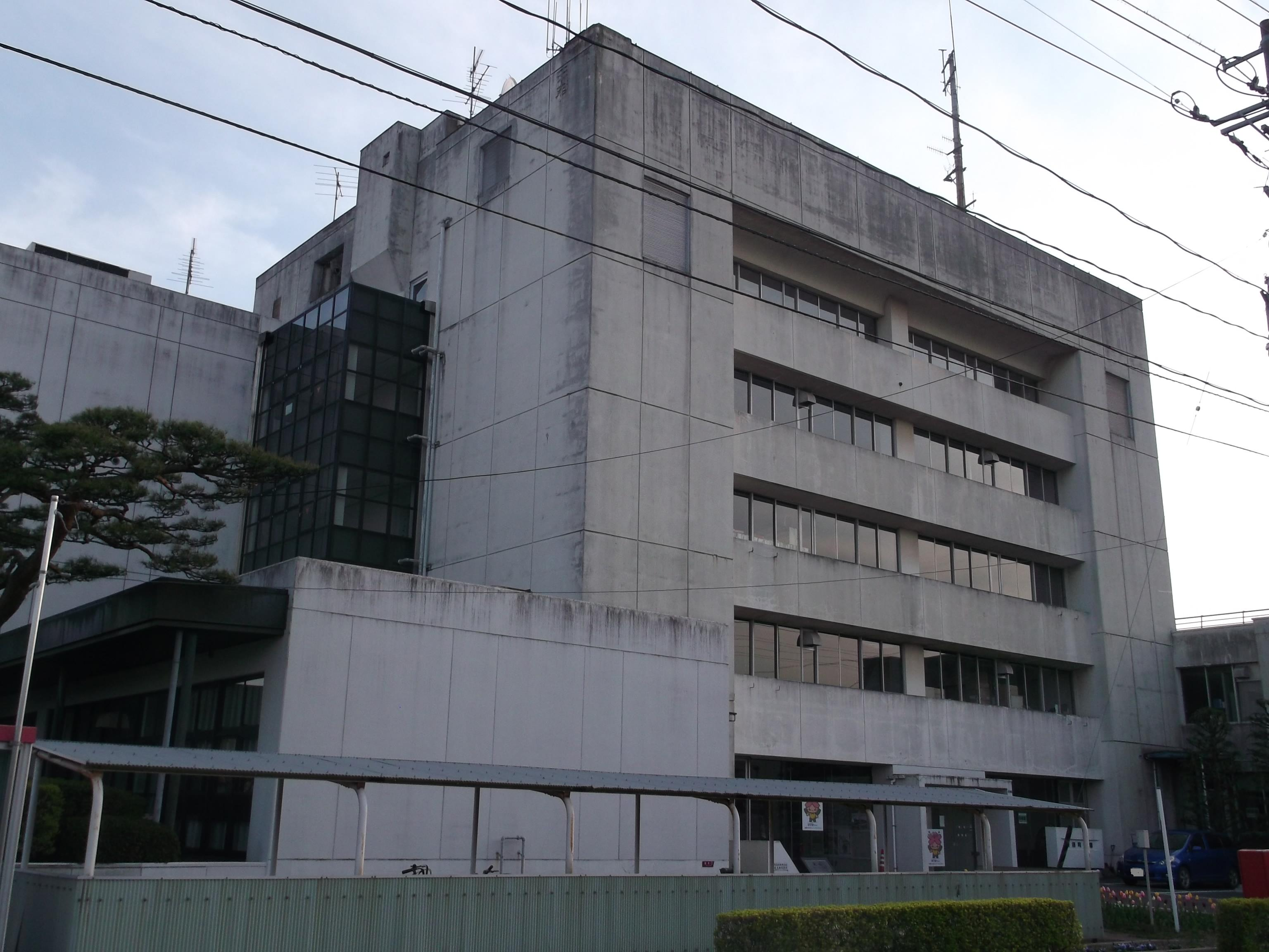 宮城県柴田郡柴田町役場